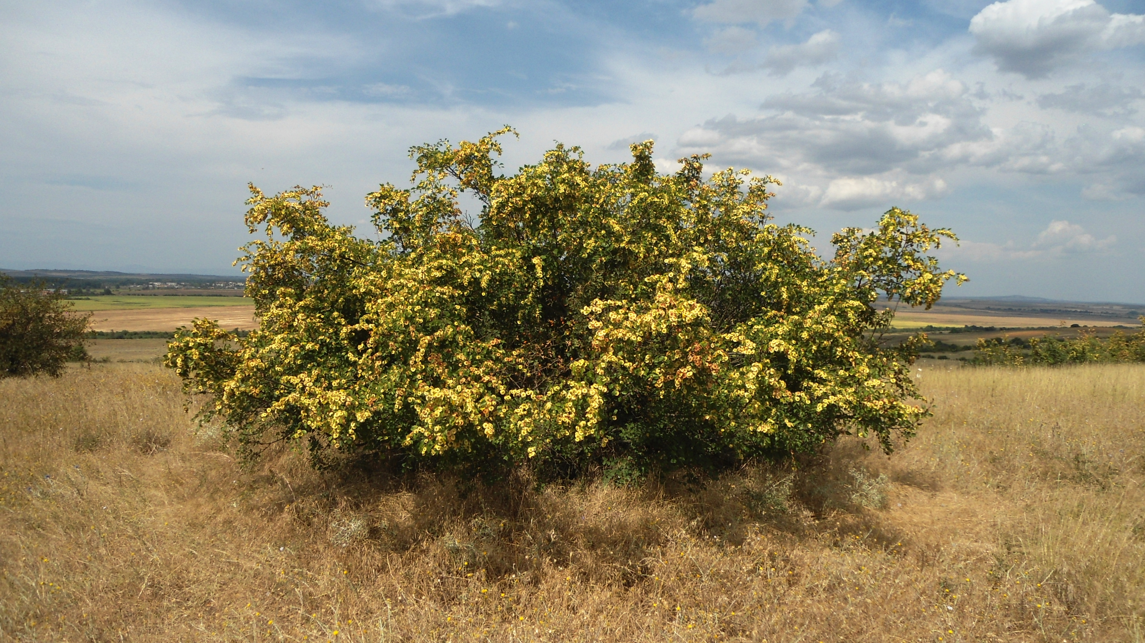 Драка с плодове, Тунджанската хълмиста равнина.